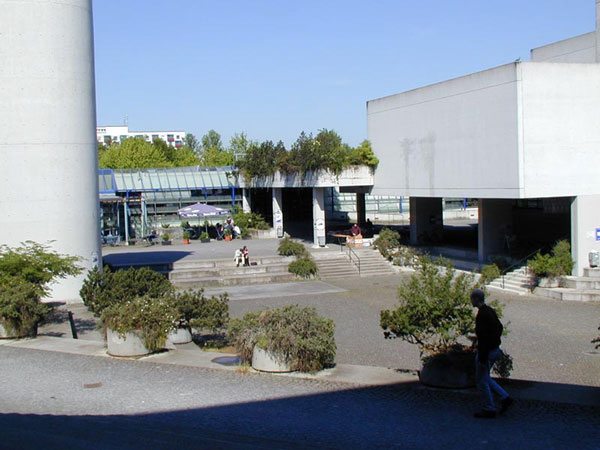 Universität Regensburg, Forum, Eingang Mensa Copyright: Meine eigene Photographie (Michael.chlistalla), Verwendung gestattet (GNU FDL).